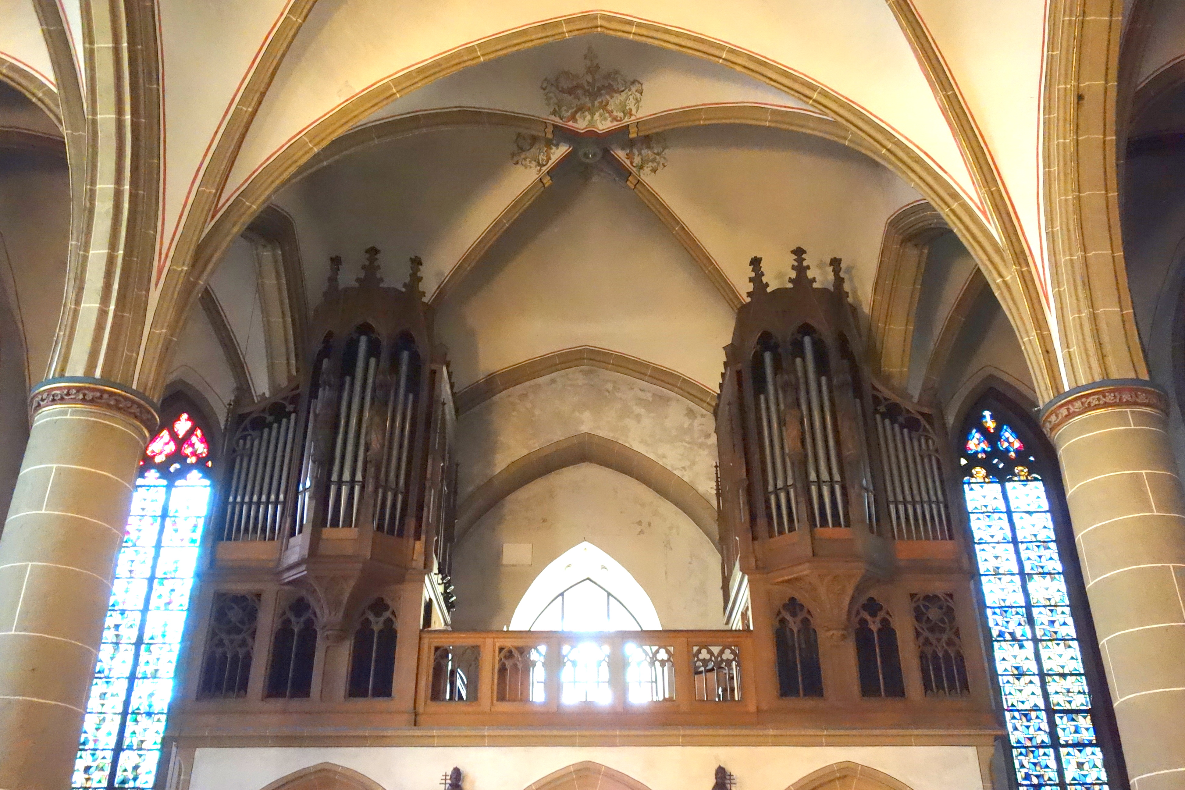 St. Clemens Telgte, Kreis Warendorf, Nordrhein-Westfalen, Deutschland